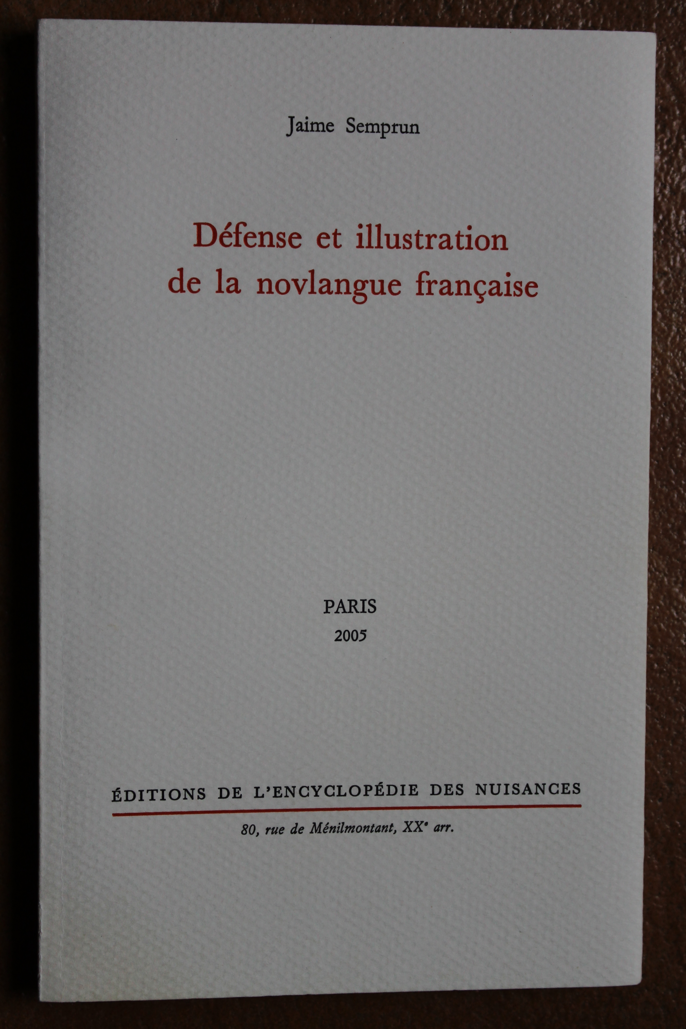 Couverture de Défense et illustration de la langue française par Jaime Semprun